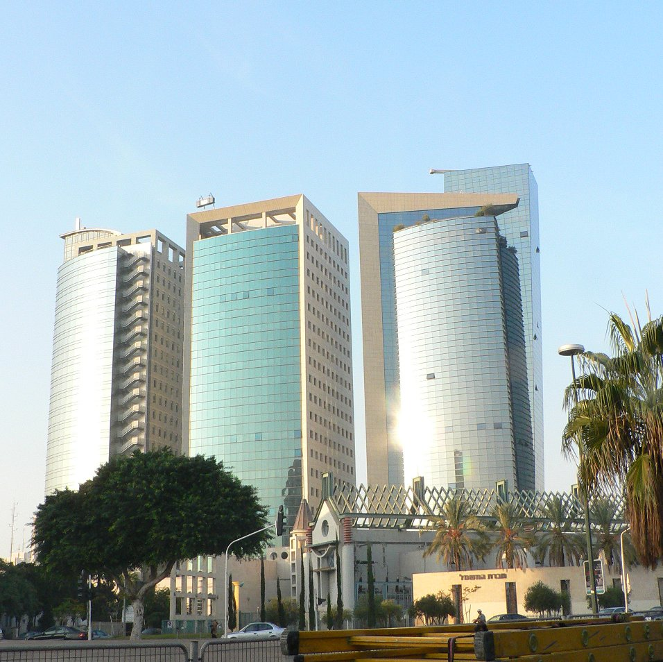 "South of Kirya" Towers, Tel Aviv, Israel מגדלי דרום הקרייה, תל אביב